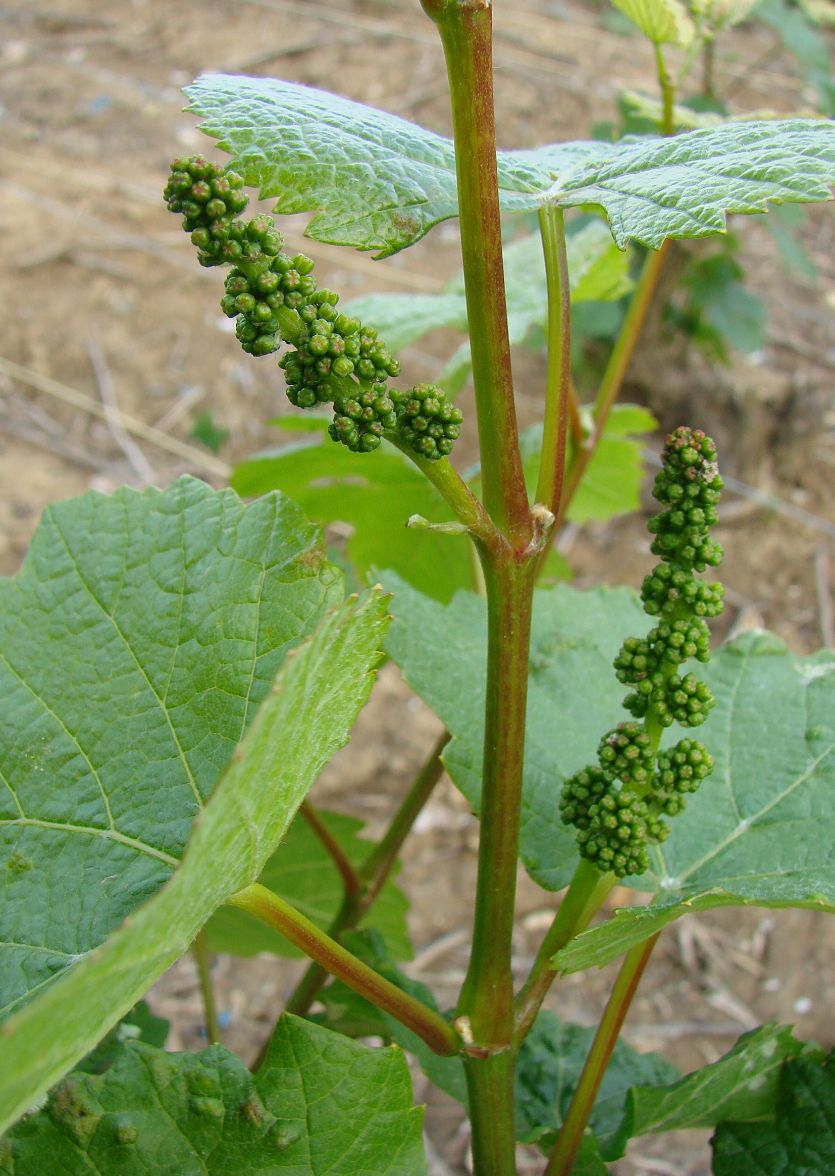 Vitis vinifera; Anordnung der Gescheine, des länglichen, rispenartigen Blütenstands der Weinrebe auf einem einjährigen Trieb